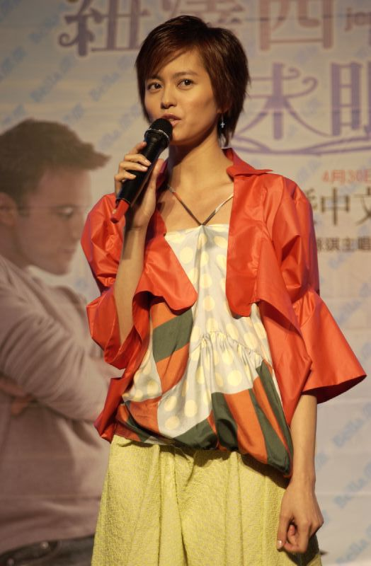 Gigi Leung梁詠琪(a singer)